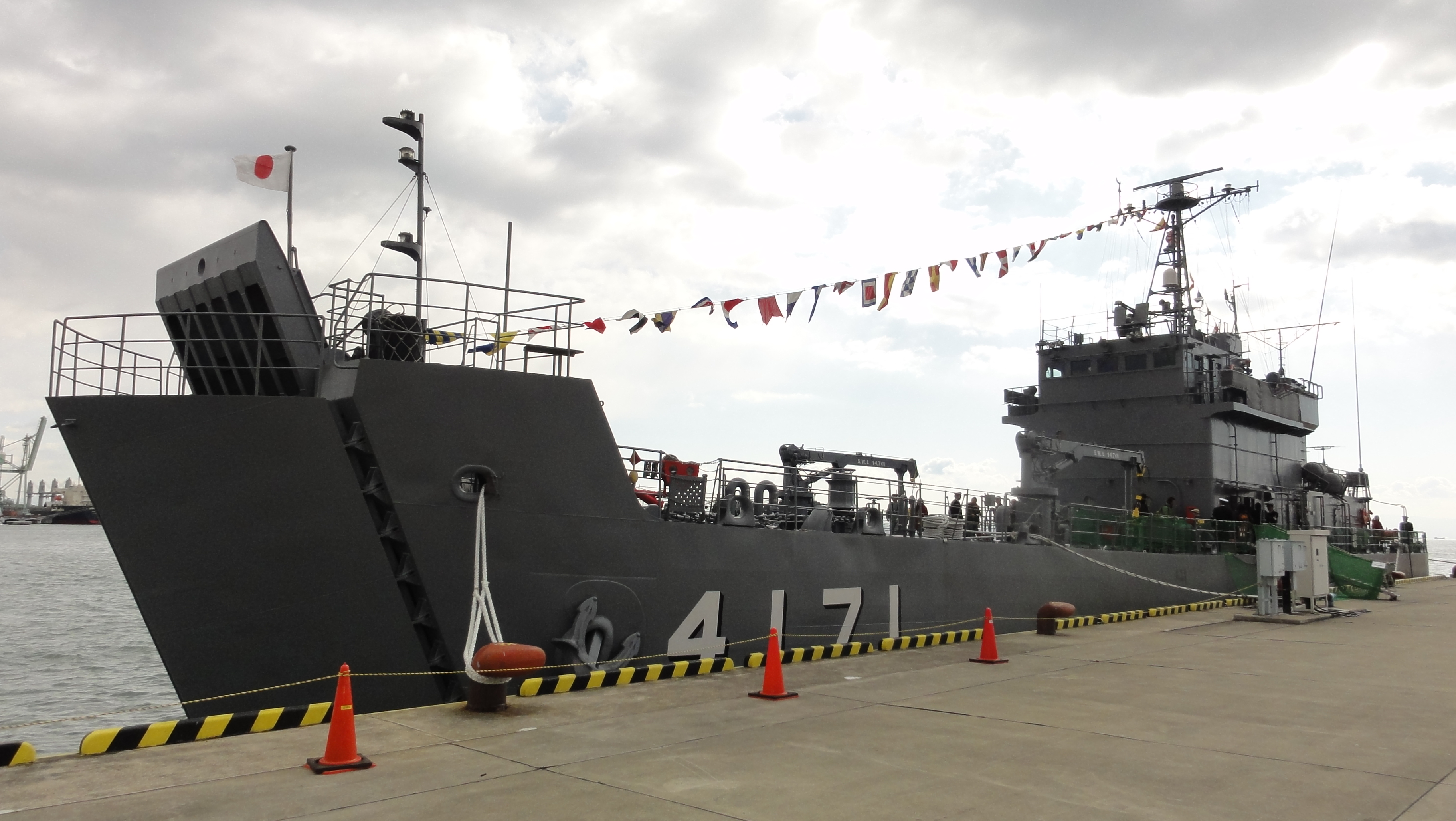 輸送艦ゆら（LSU-4171） 2012年2月11日 海上自衛隊阪神基地にて